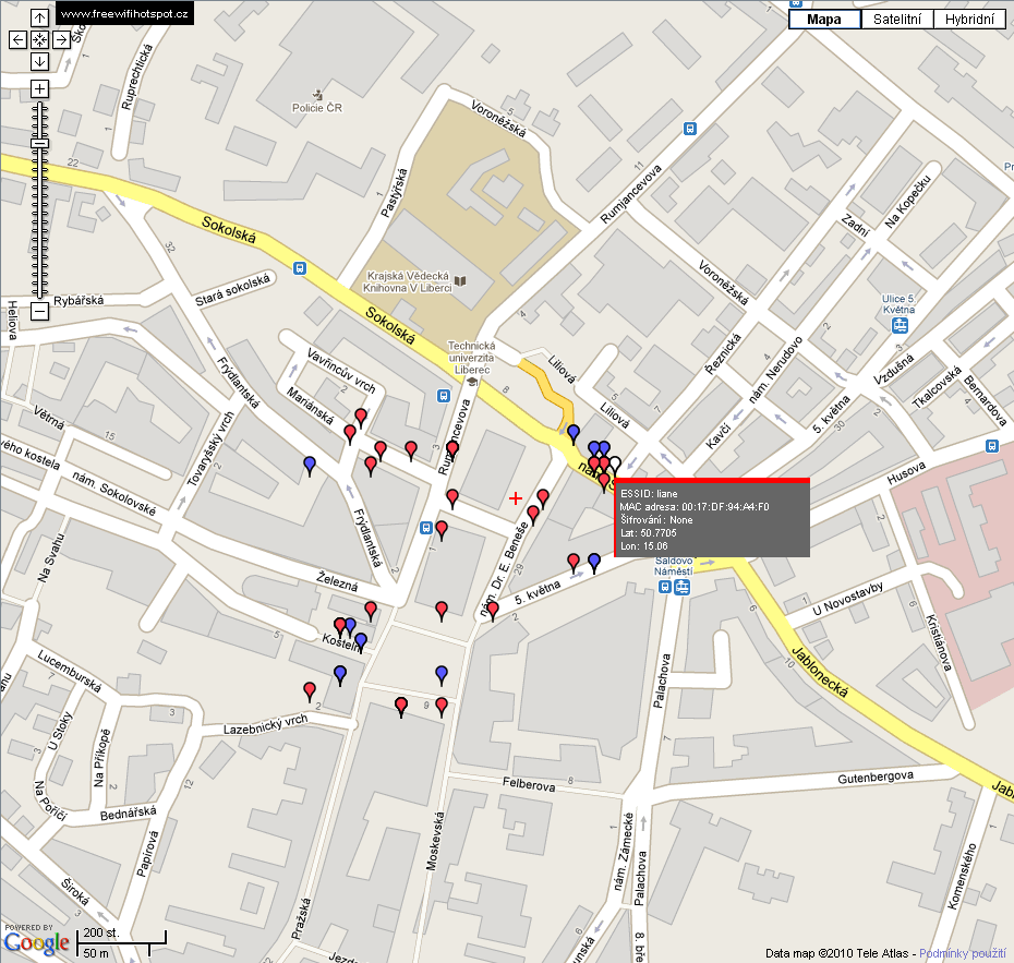 WIFI mapa části města Liberce